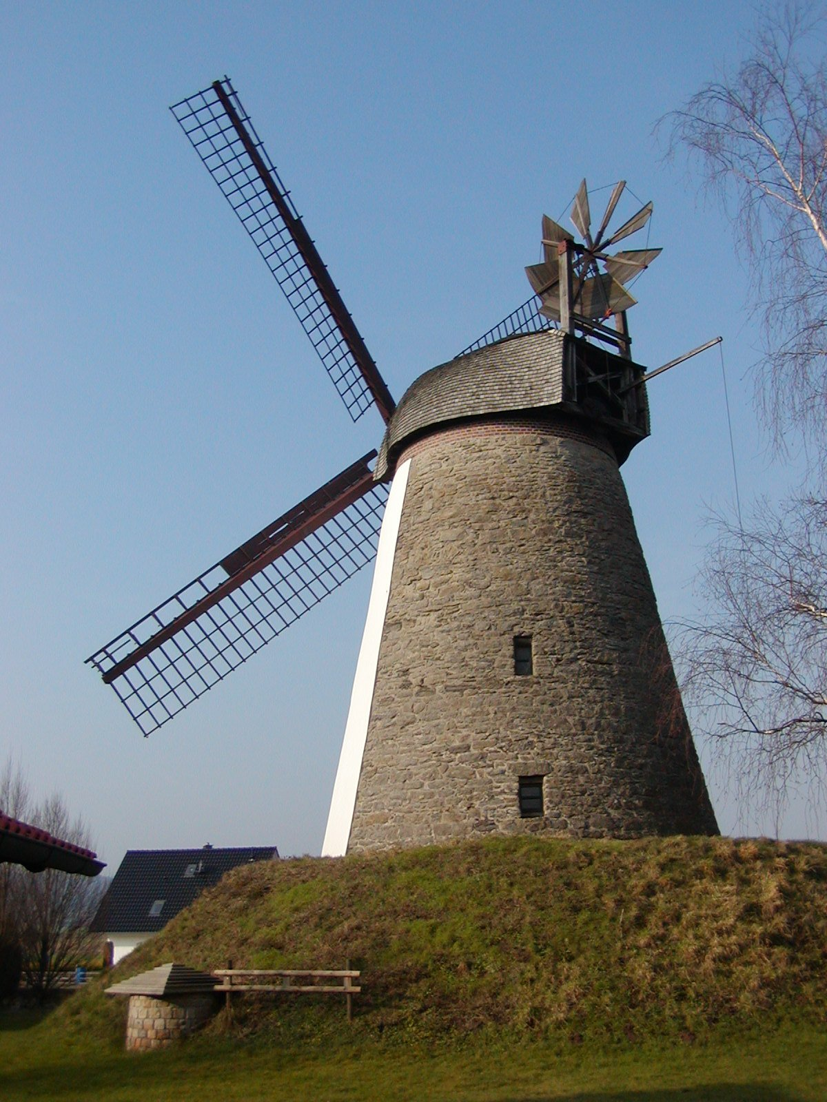 Die Windmühle (auch Hummelbecker Windmühle) in Dützen bei Minden in Nordrhein-Westfalen. Die Mühle ist zwischen 1808 und 1813 errichtet wurde. Seit der Restaurierung besitzt der Wallholländer mit seiner hohen Durchfahrt wieder eine Haube, eine Windrosenanlage und windgängige Segelflügel. Die Mühle ist Teil der Westfälischen Mühlenstraße.